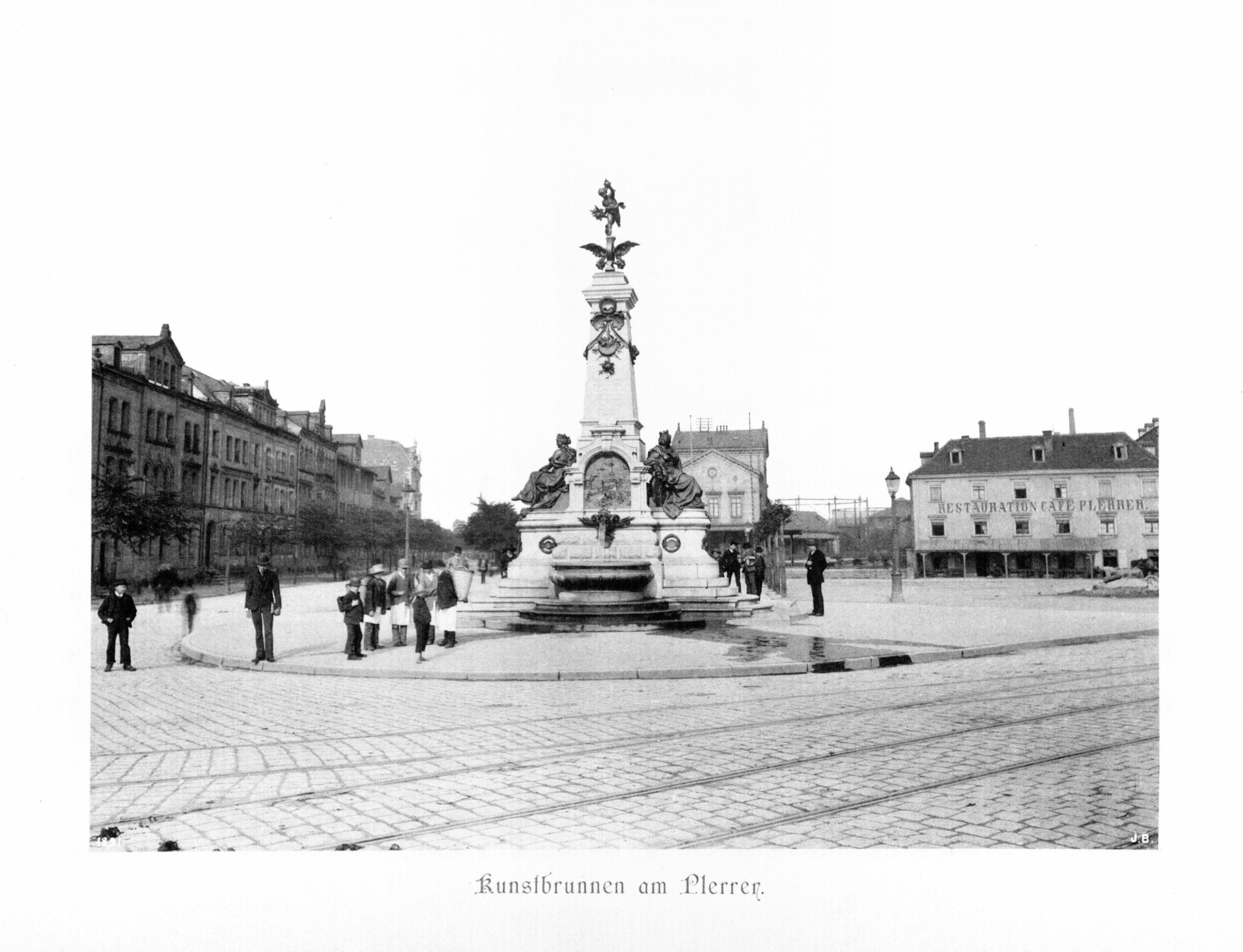 Kunstbrunnen am Plerrer. aus dem Band Die Baudenkmäler der Stadt Nürnberg. Erste Nürnberger Lichtdruckanstalt & Kunstverlag Brunner. Nürnberg 1891. 2011 digitalisiert von der Ohm-Hochschulbibliothek Nürnberg. Exemplar mit der Signatur: Nürnberg, Ohm-Hochschulbibliothek -- 901/2.213 / M a